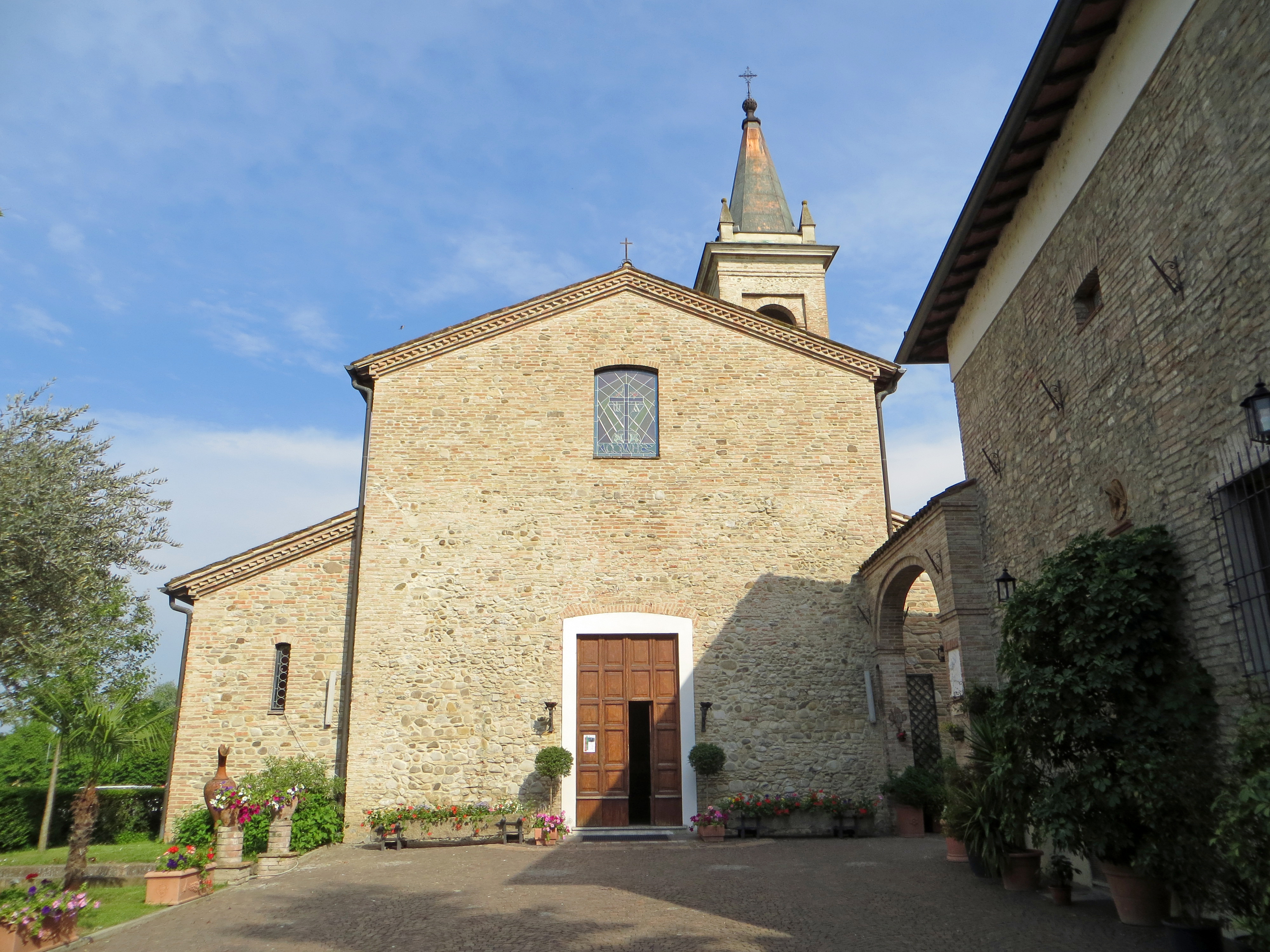 Chiesa di San Prospero (Marore) - facciata